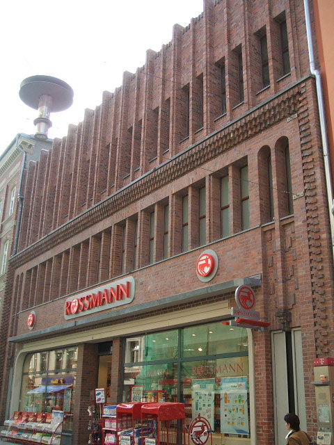 Stralsund,_Germany,_Kaufhaus_Tietz_(2006-09-29)